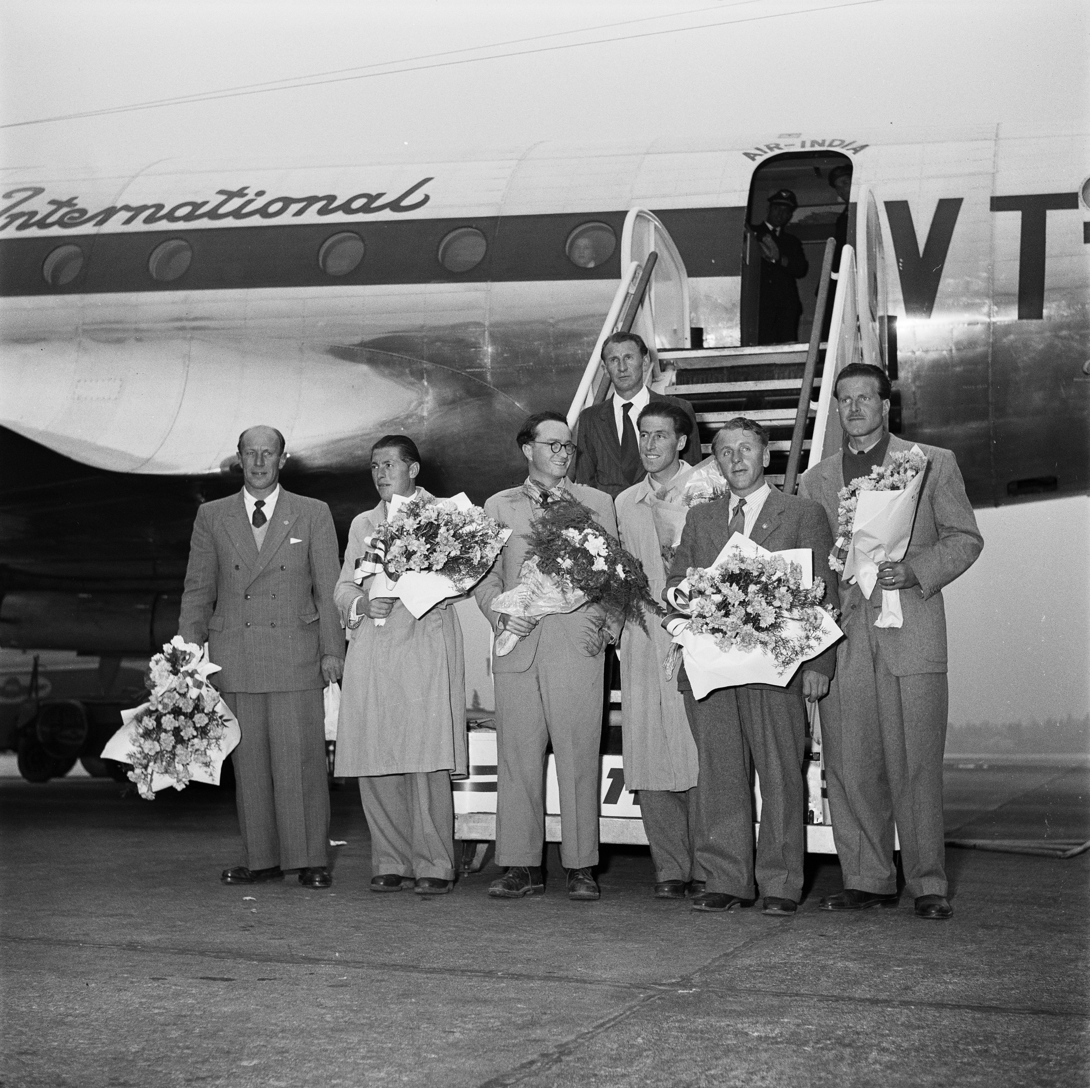 Schweizer Himalaya-Expedition 1952 Herbst: Vor einer Air India Lockheed L749 Constellation, Flughafen Genf Cointrin. Teilnehmer: (von links) Raymond Lambert, Arthur Spöhel (Bergführer), Gabriel Chevalley, Ernst Reiss, Gustave Gross, Norman Dyhrenfurth, Jean Buzio (auf Treppe)